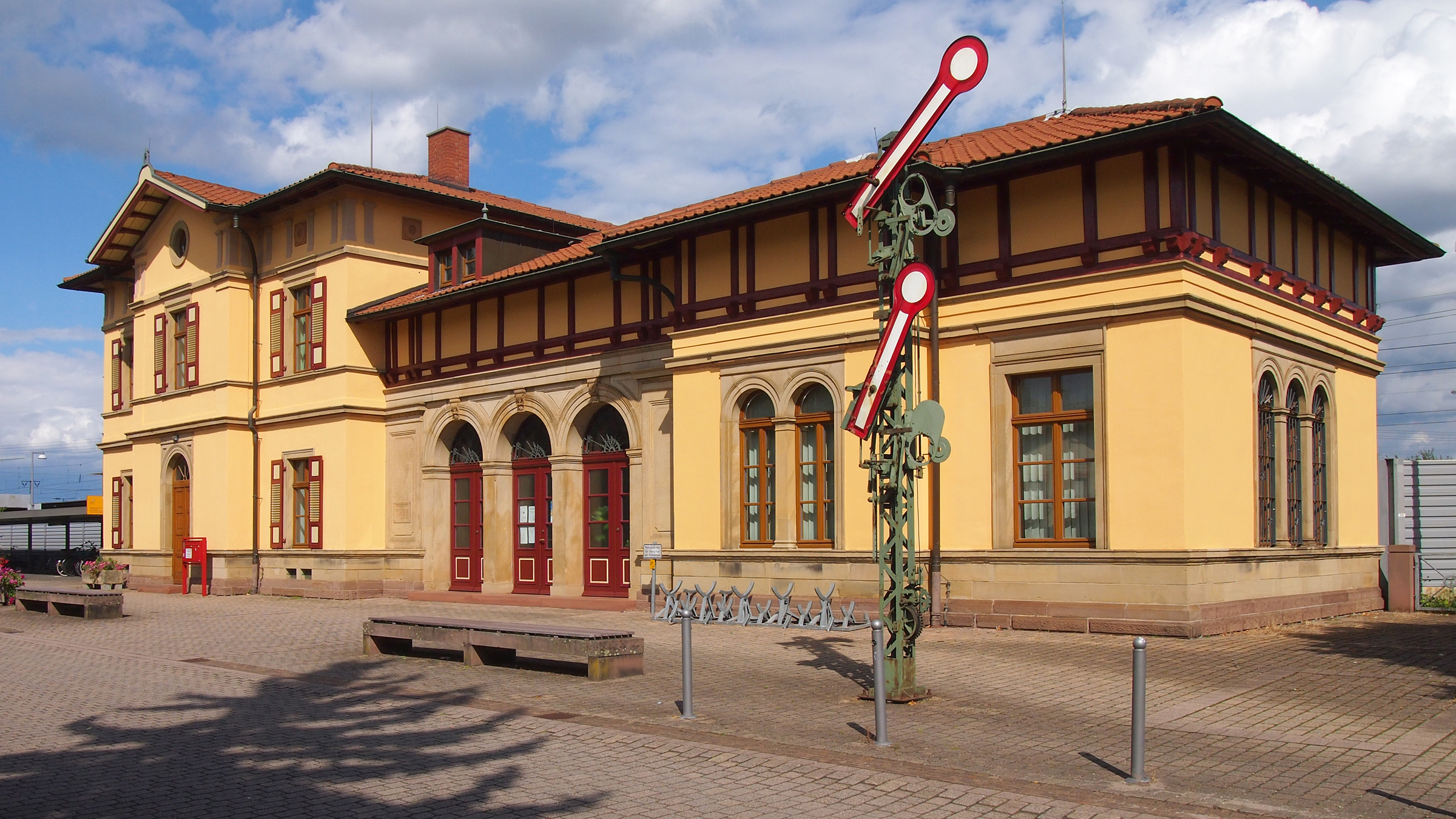 Graben-Neudorf alter Bahnhof